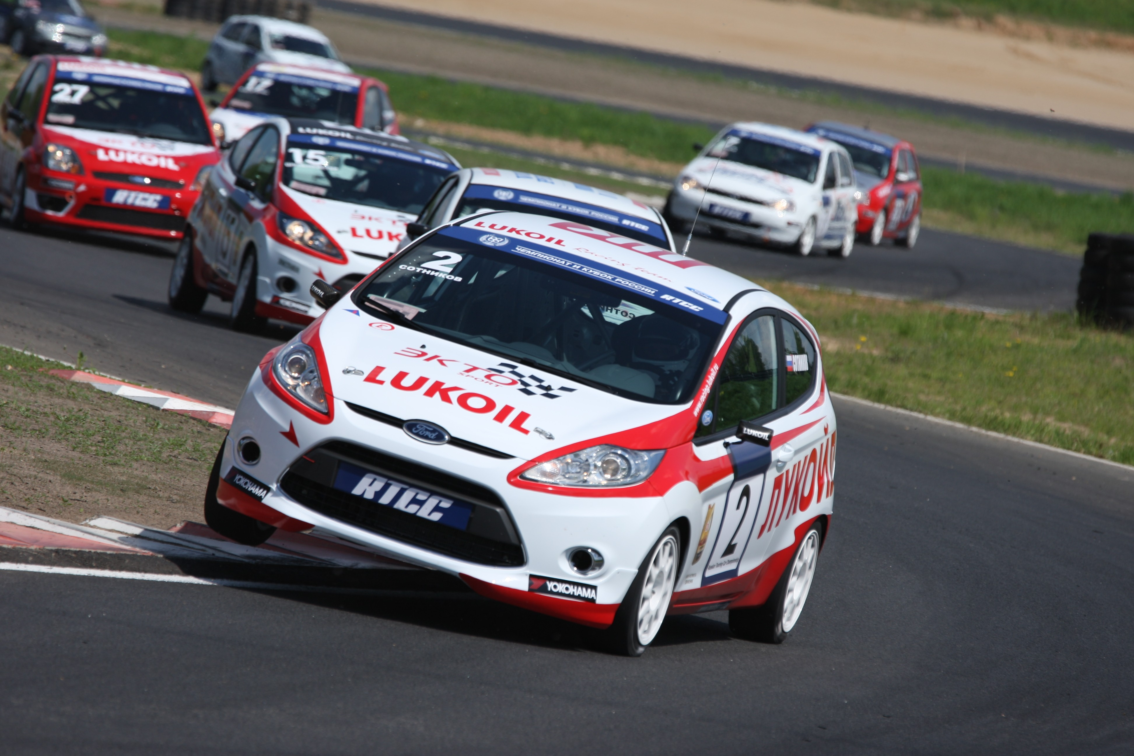 Смоленское кольцо , 1 этап RTCC 2011